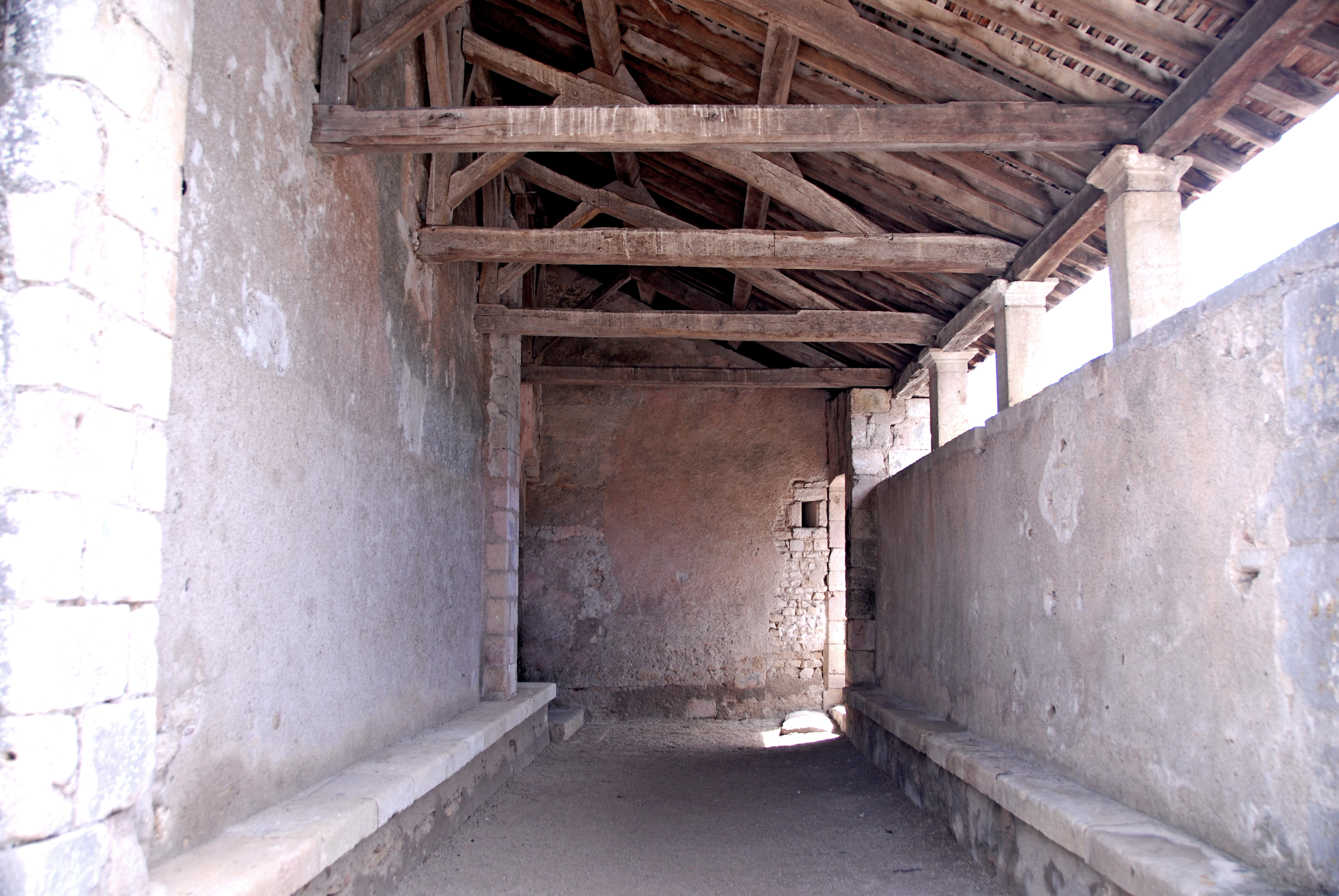 Antigny, Kirche, Narthex von N